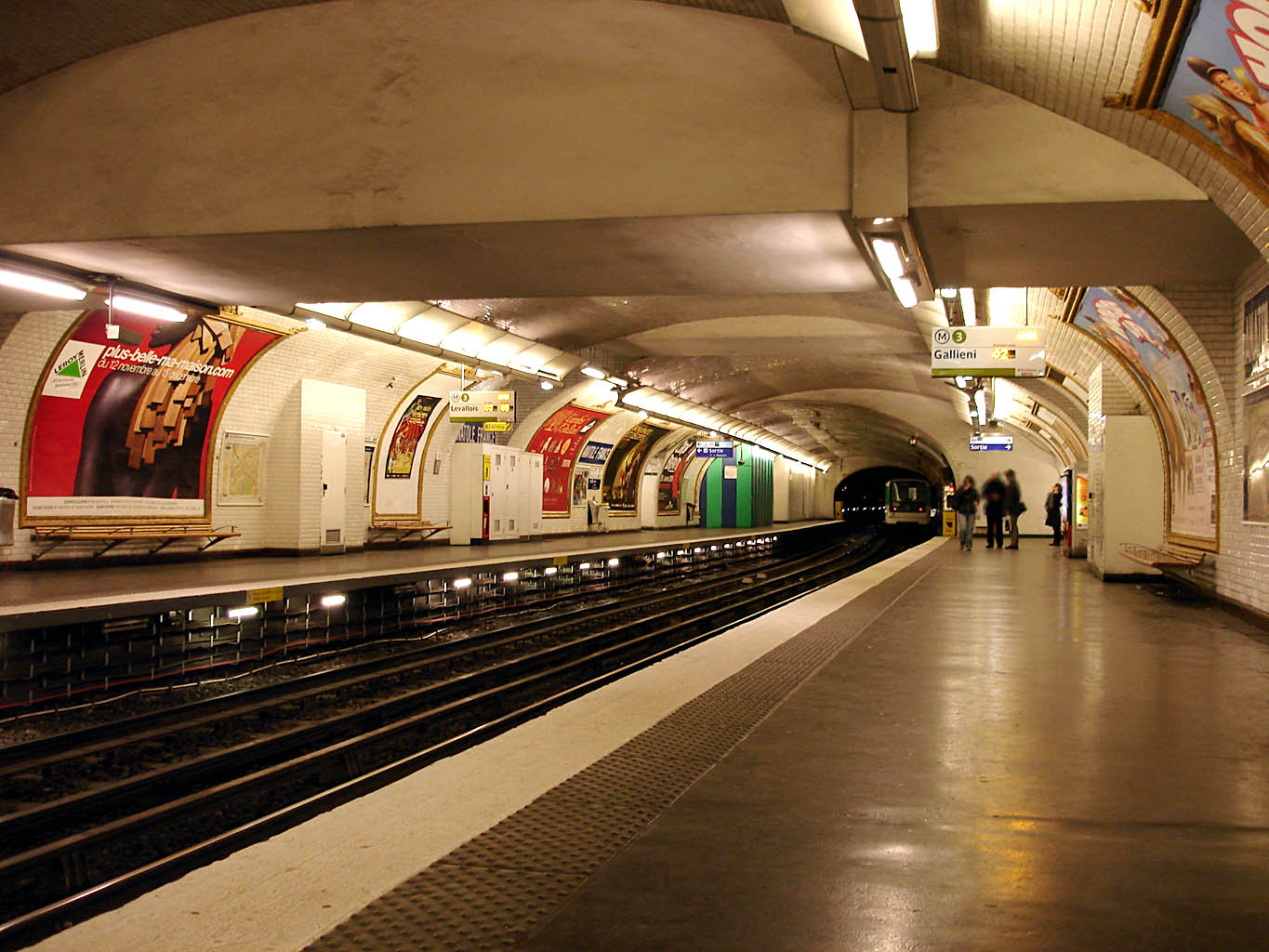 Station Anatole France de la ligne 3 du métro de Paris, France.